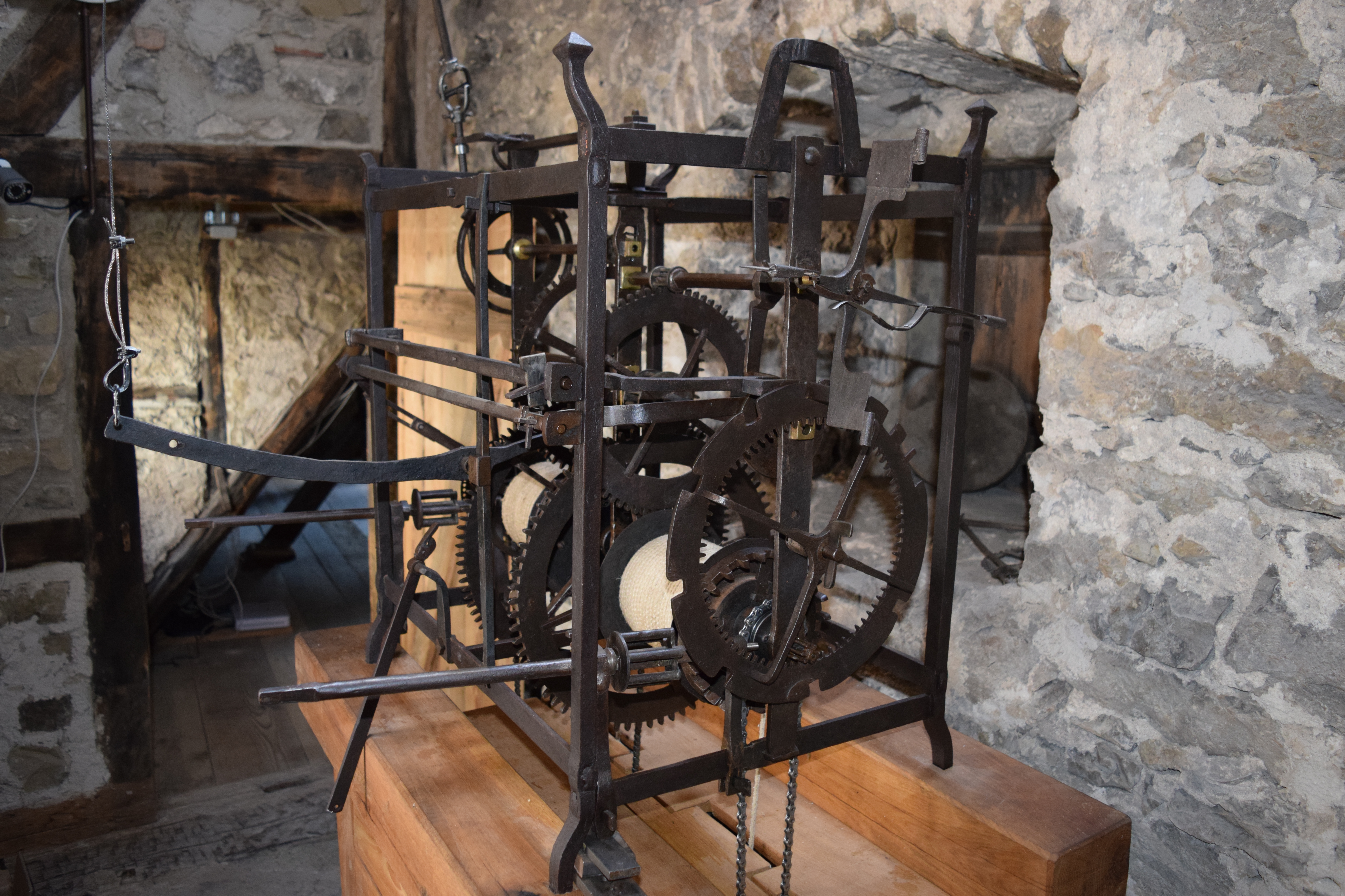 Einebautes Uhrwerk im Februar 2018